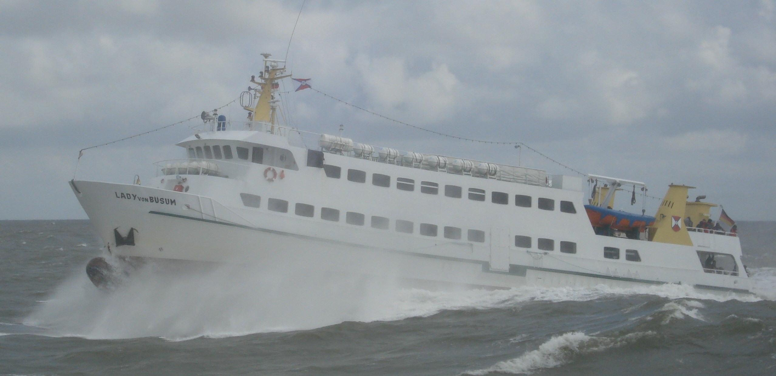 MS Lady von Büsum bei Hohen Wellengang in der Nordsee